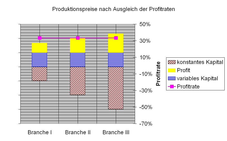 Schema II zur Verständlichmachung der Produktionspreise